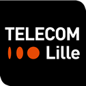 Logo de Telecom Lille